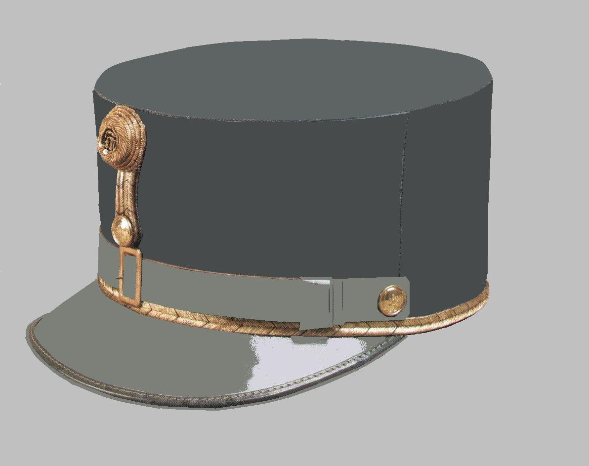 Feldgraue k.u.k. Offizierskappe